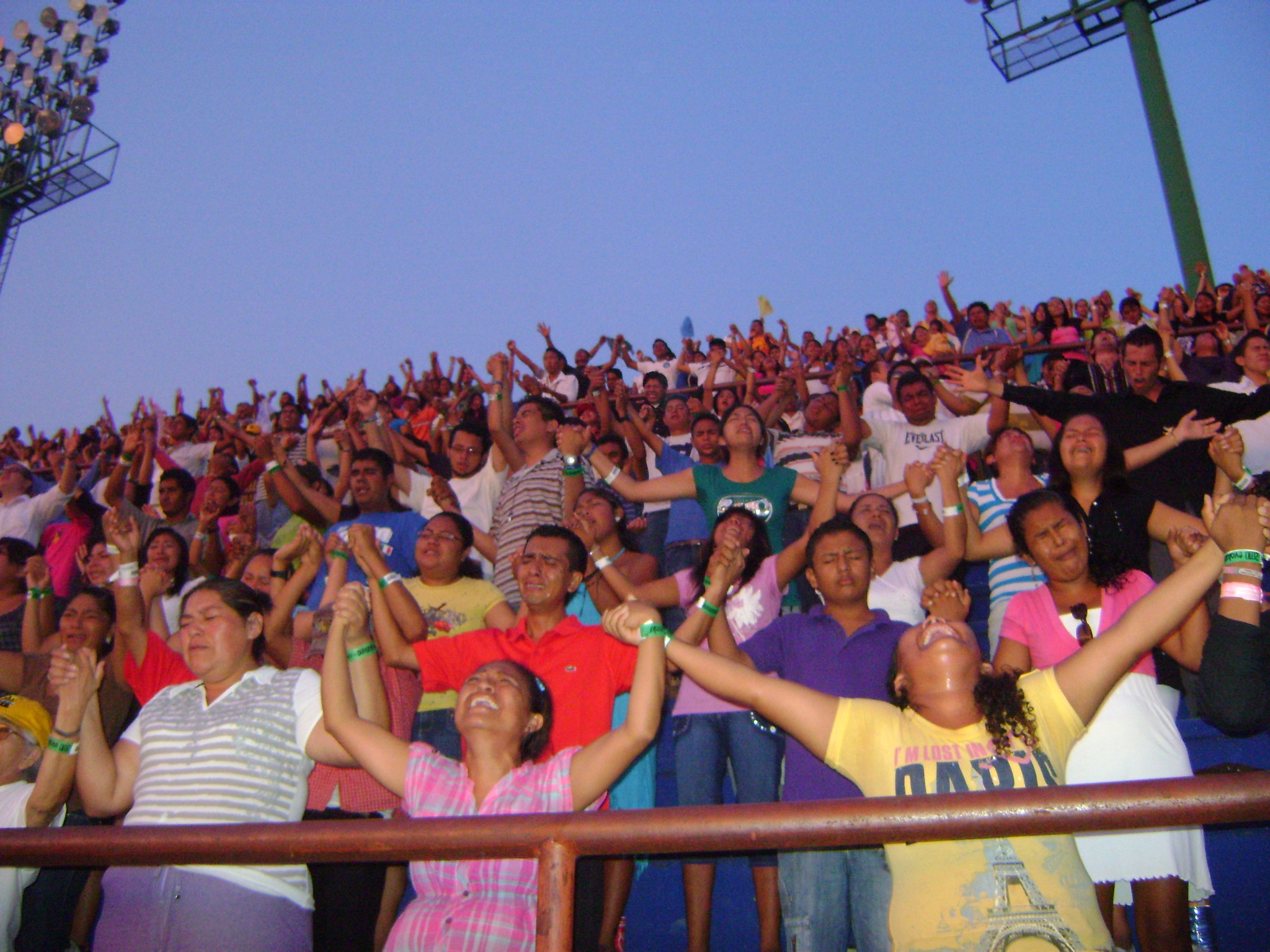 Congreso Nacional Juvenil de las Asambleas de Dios efectuado el 15 de Julio de 2010 en Cancún, Q. Roo, México.